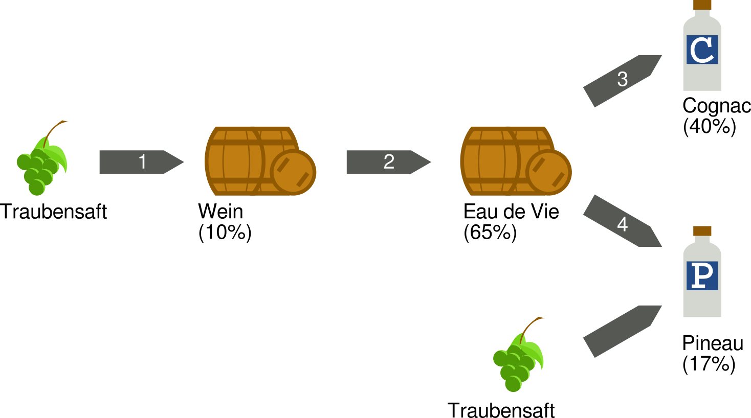 Hier stelle ich dar, wie aus Traubensaft Cognac und Pineau hergestellt werden. Zu der Grafik muss ein kurzer, erklärender Text beigefügt werden (sie ist nicht 100%-selbstredend)